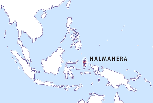 omatehtud